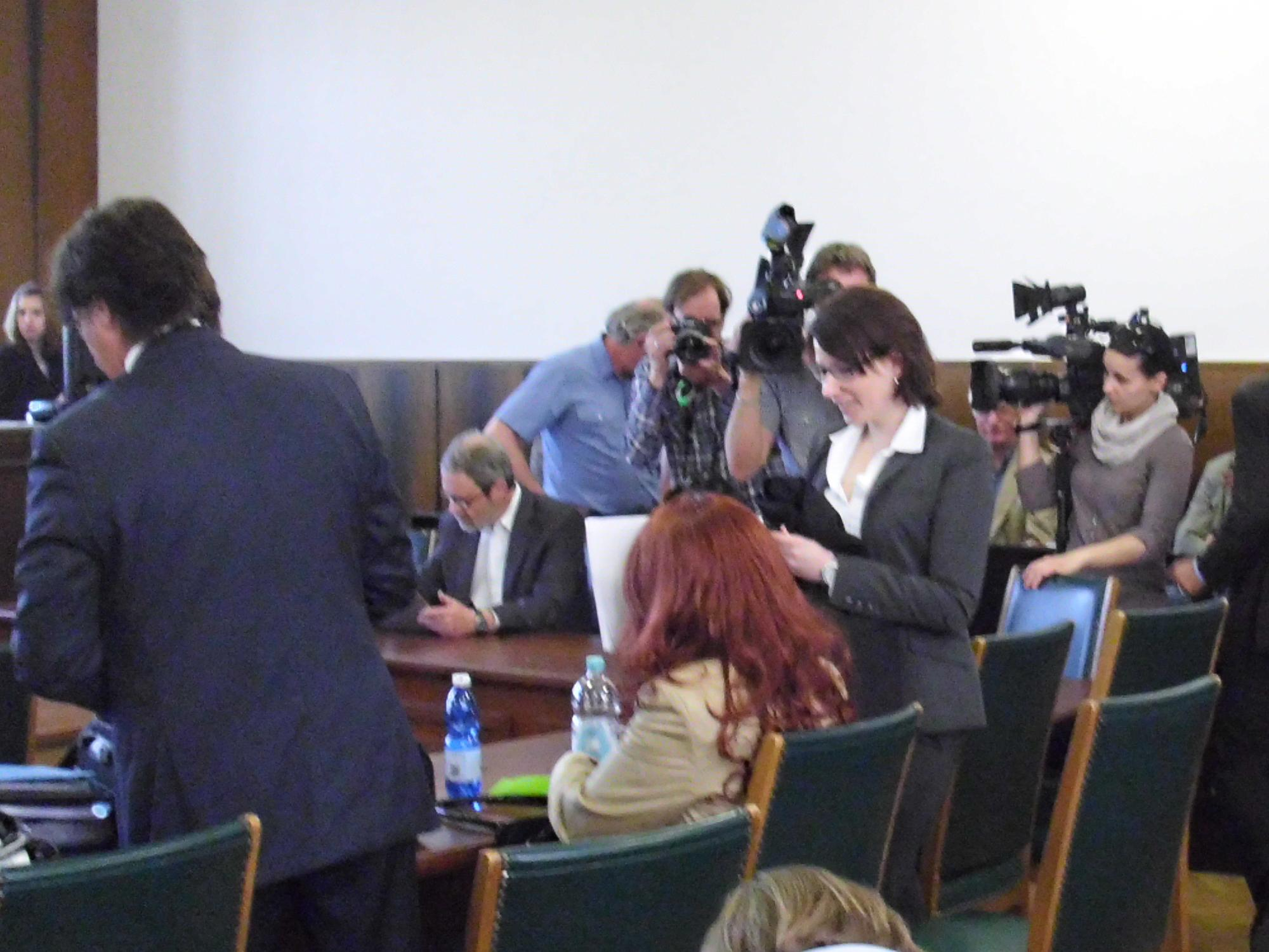 Fall Horst Arnold: Prozesstag1 am Landgericht, Angeklagte Heidi K. mit Verteidigern